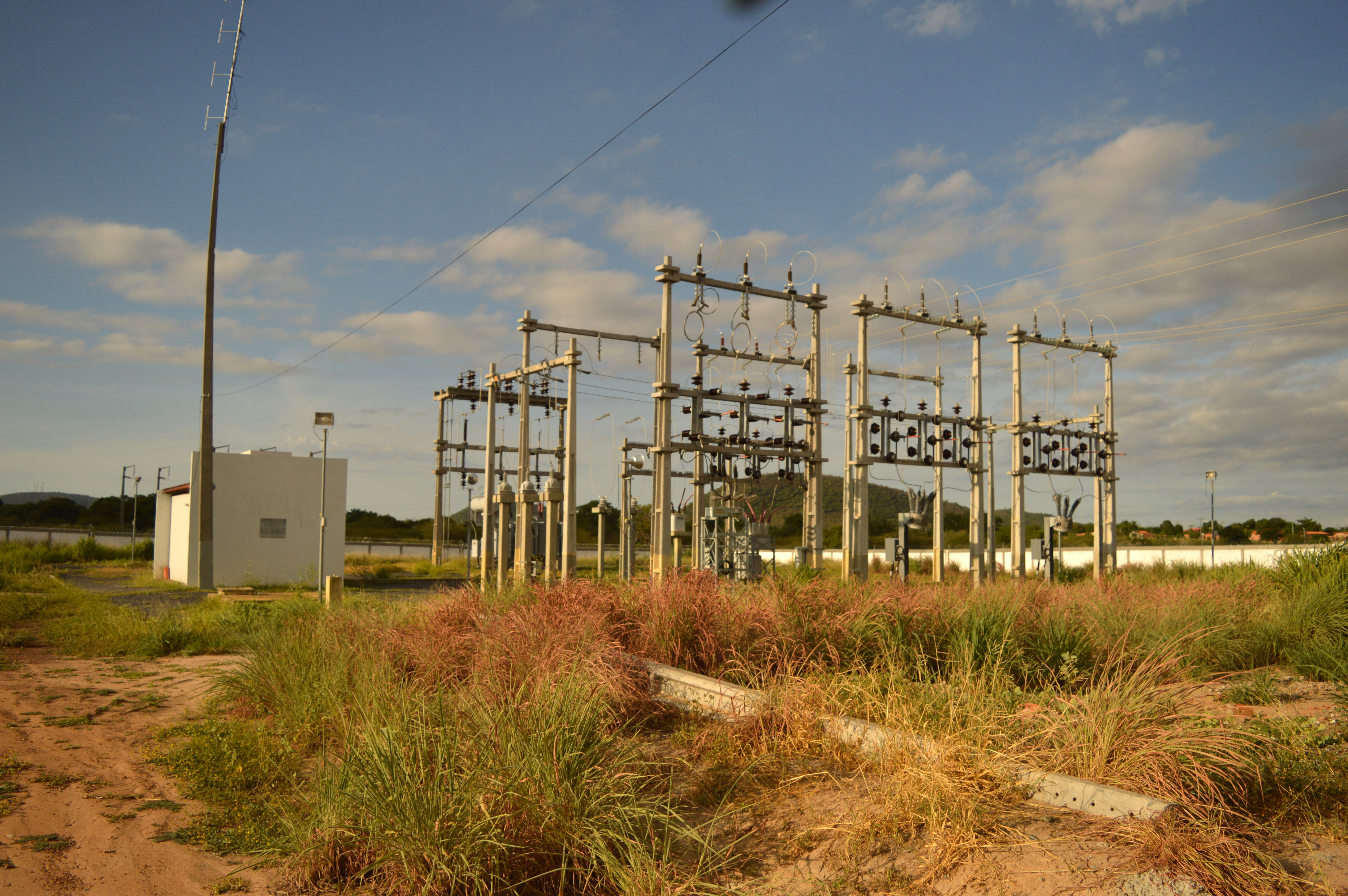 Subestação de energia da cidade de Paratinga. Foto de 19 de janeiro de 2017.